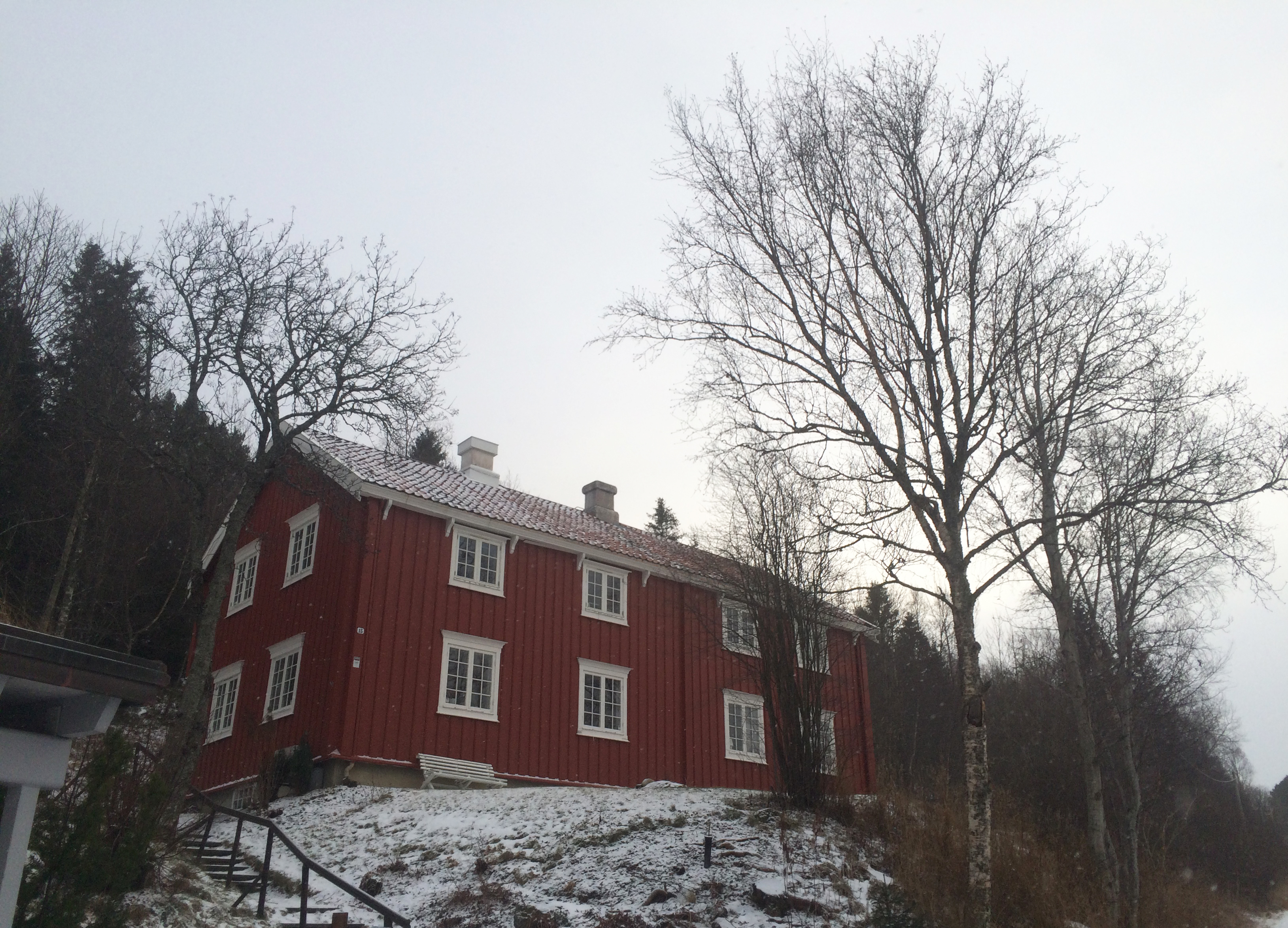 Tidligere drengestue fra Bakaunet gård i Trondheim, revet og oppført som bolig på Sverresborg (i Trondheim) i 1975